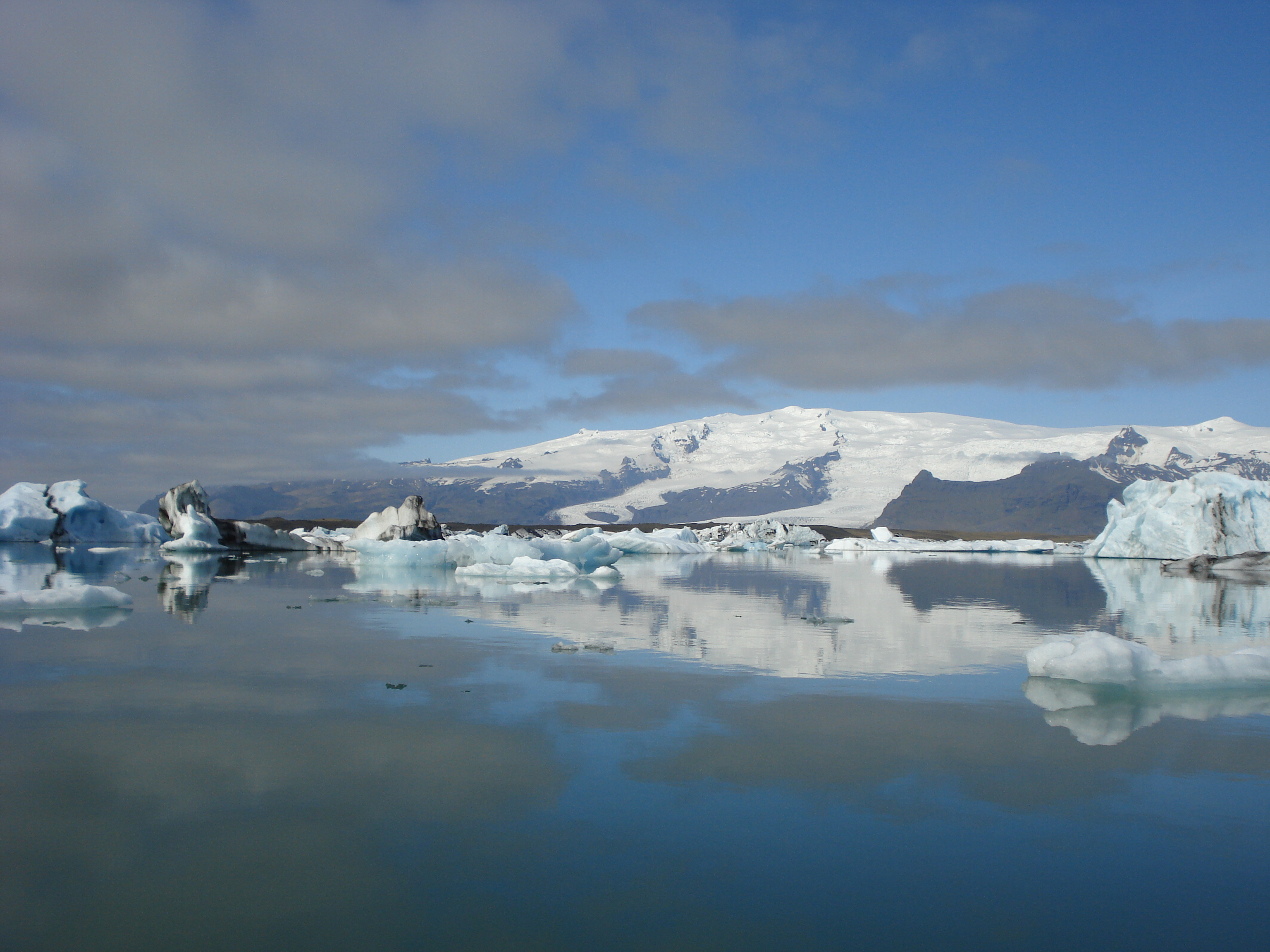 Jökulsárlón, Iceland